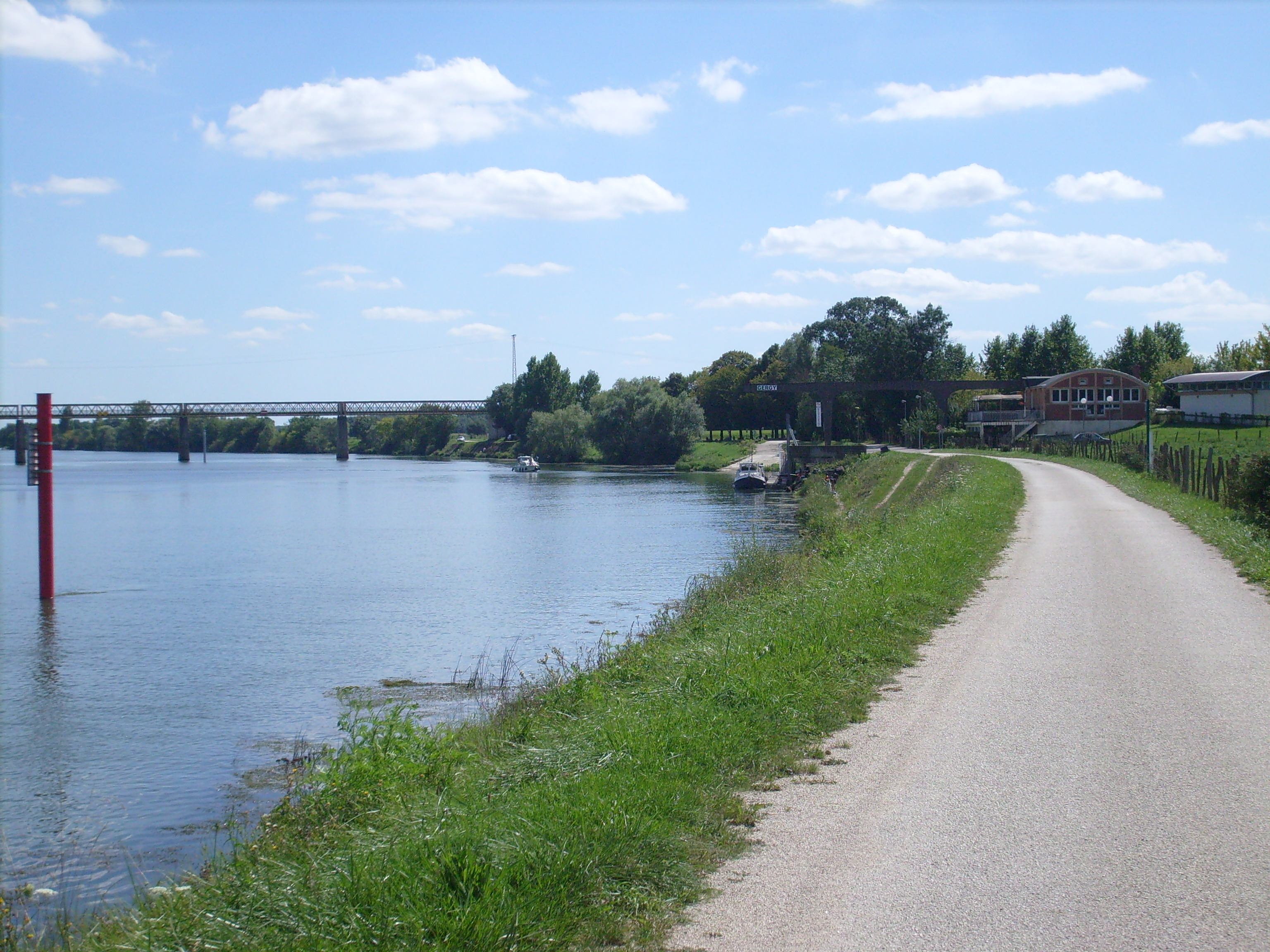 Vue depuis Raconnay du Pont Boucicaut et du Fil de L'Eau à Gergy (71)